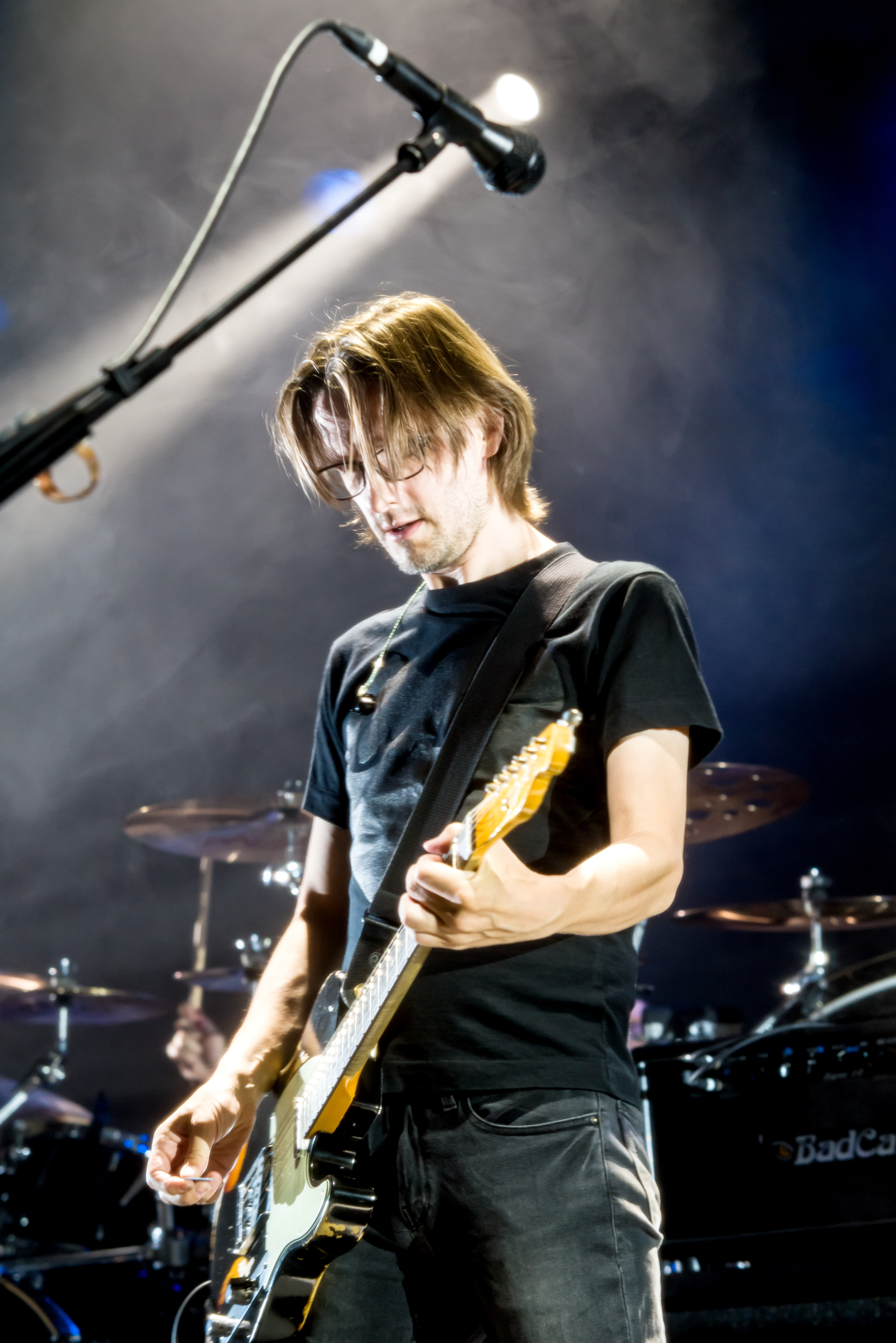 Bilder vom Zelt Musik Festival 2018 in Freiburg im Breisgau Das Eröffnungskonzert mit Steven Wilson